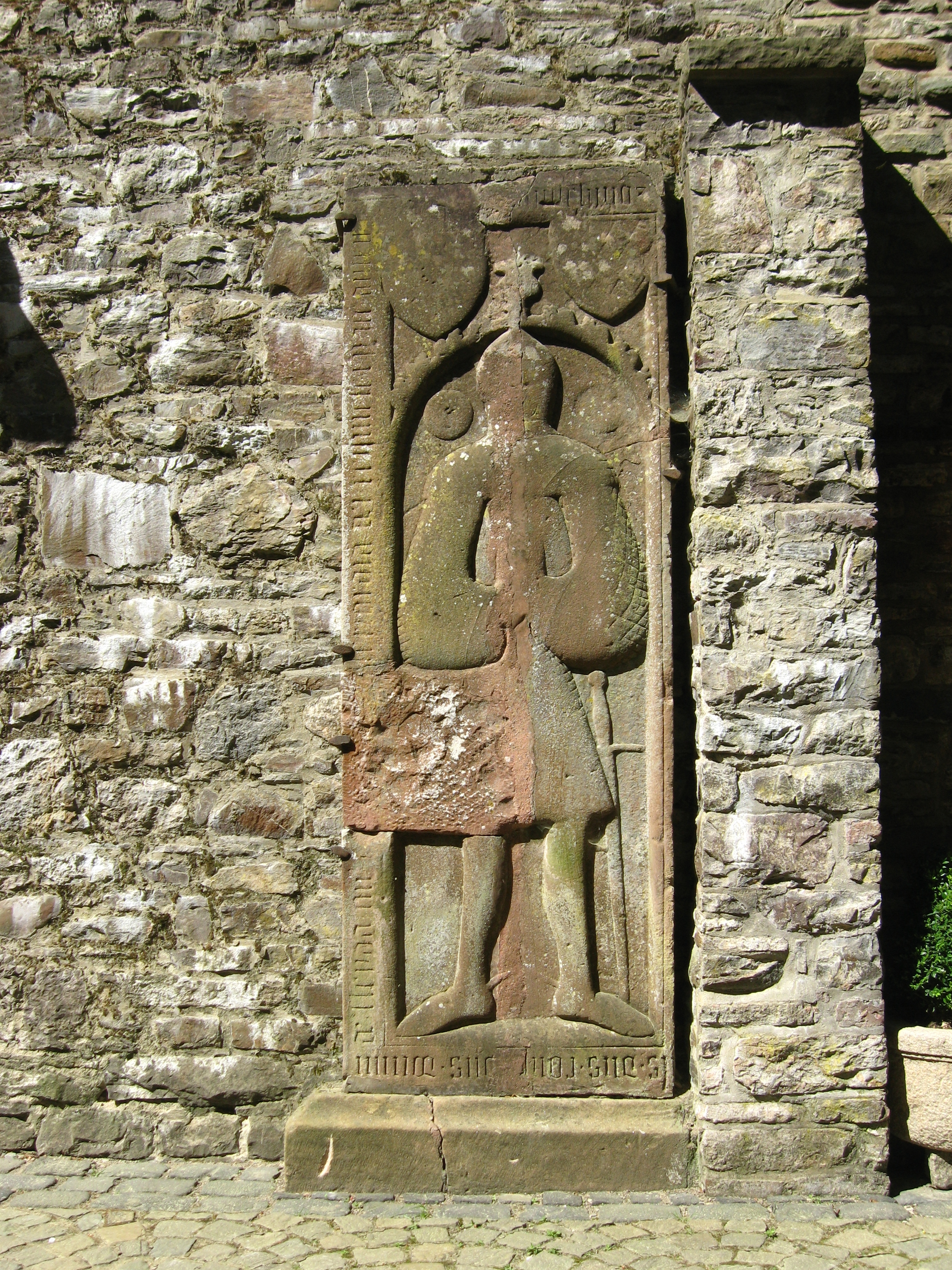 Schleiden, Schlosskirche, hist. Grabplatte im Außenbereich Datum: 25.04.2011 Urheber: M. Pfeiffer alias Benutzer:Gordito1869 Quelle: privates Fotoarchiv des Urhebers